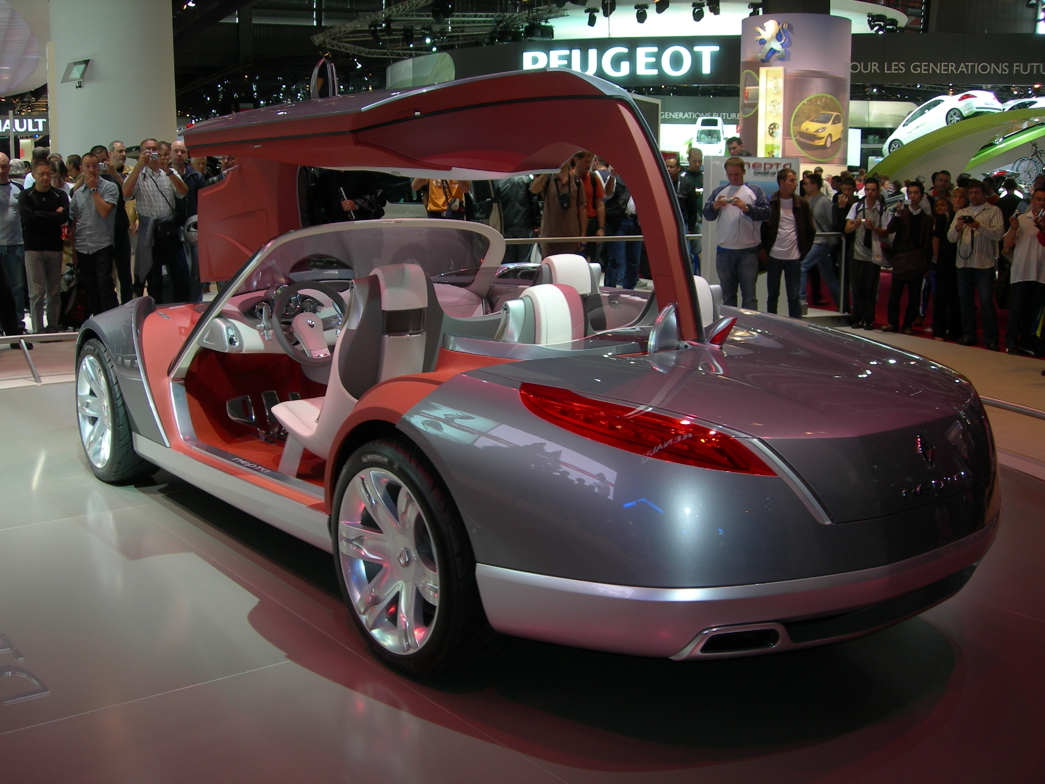 Renault Nepta concept.